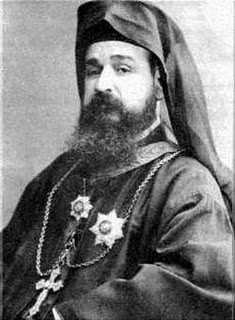 Seliger Ignatius Maloyan, Martyrer (+1915)